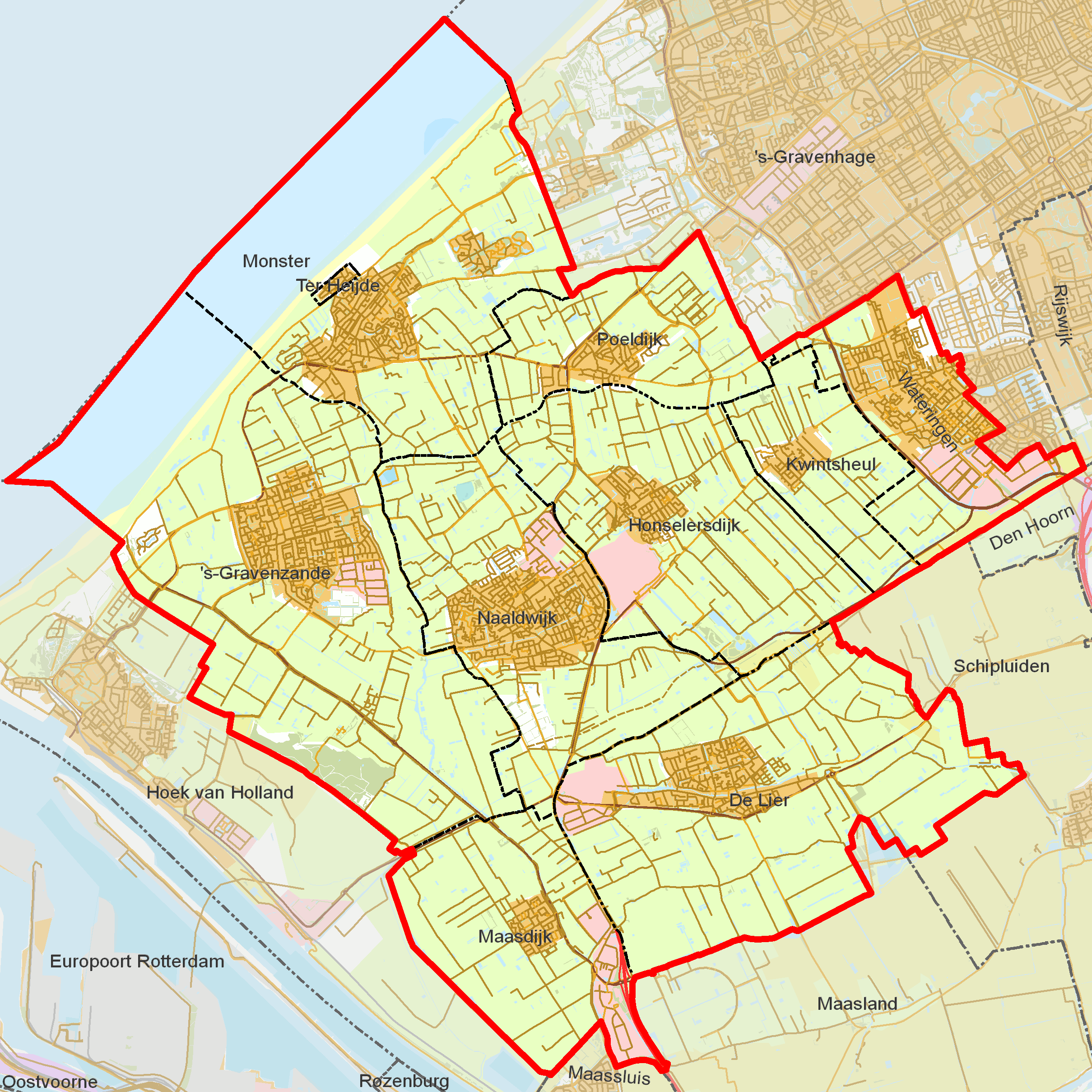 BAG woonplaatsen - Gemeente Westland.png